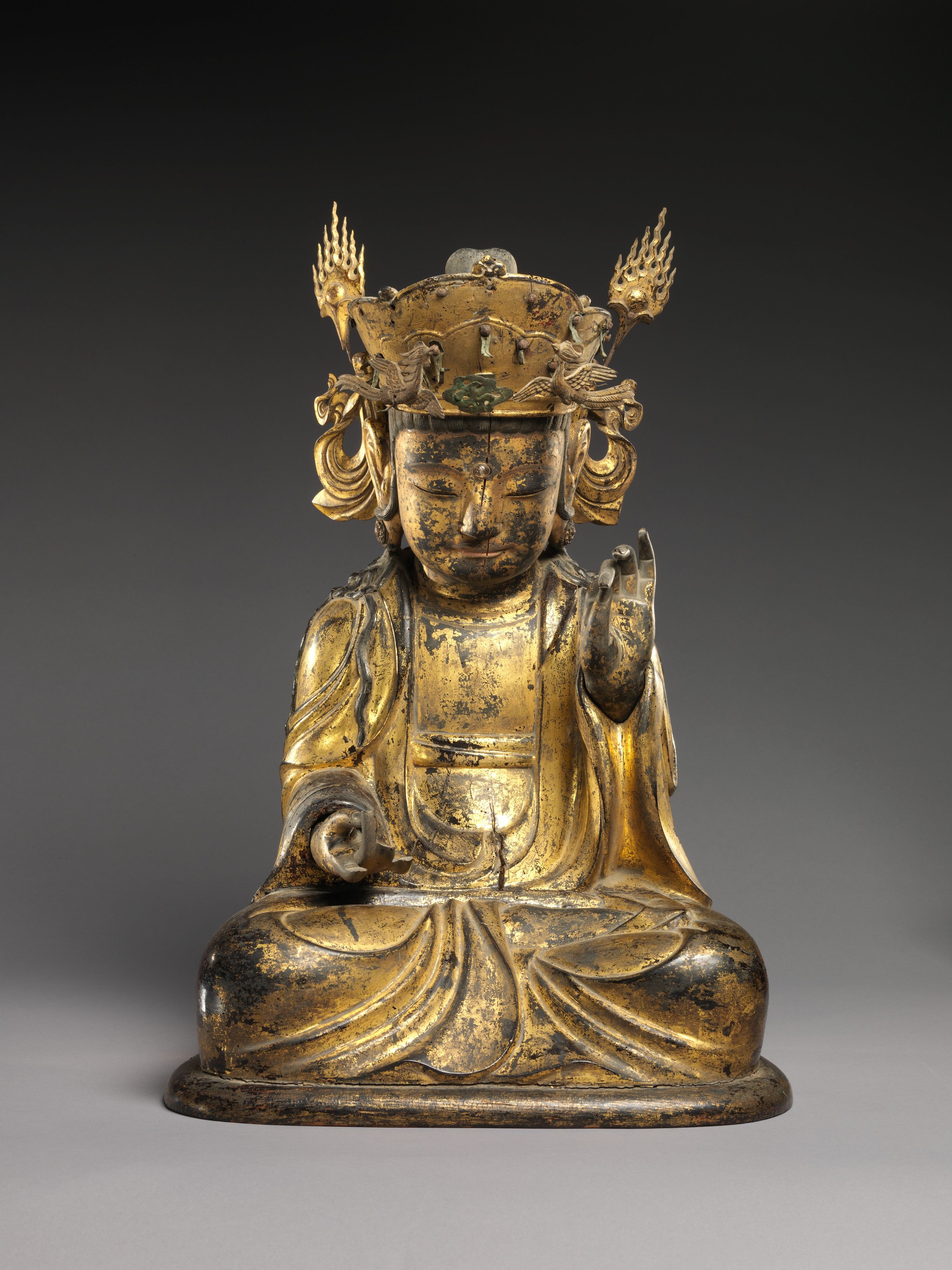 Korea; Statue; Sculpture